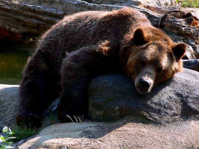 Гризли на камне, спит